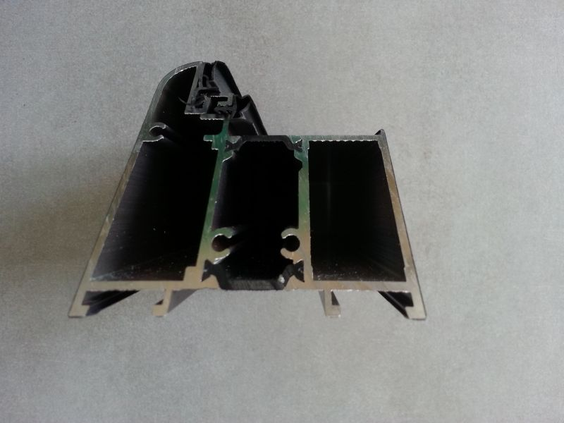 Ościeżnica wielomateriałowa pasywna